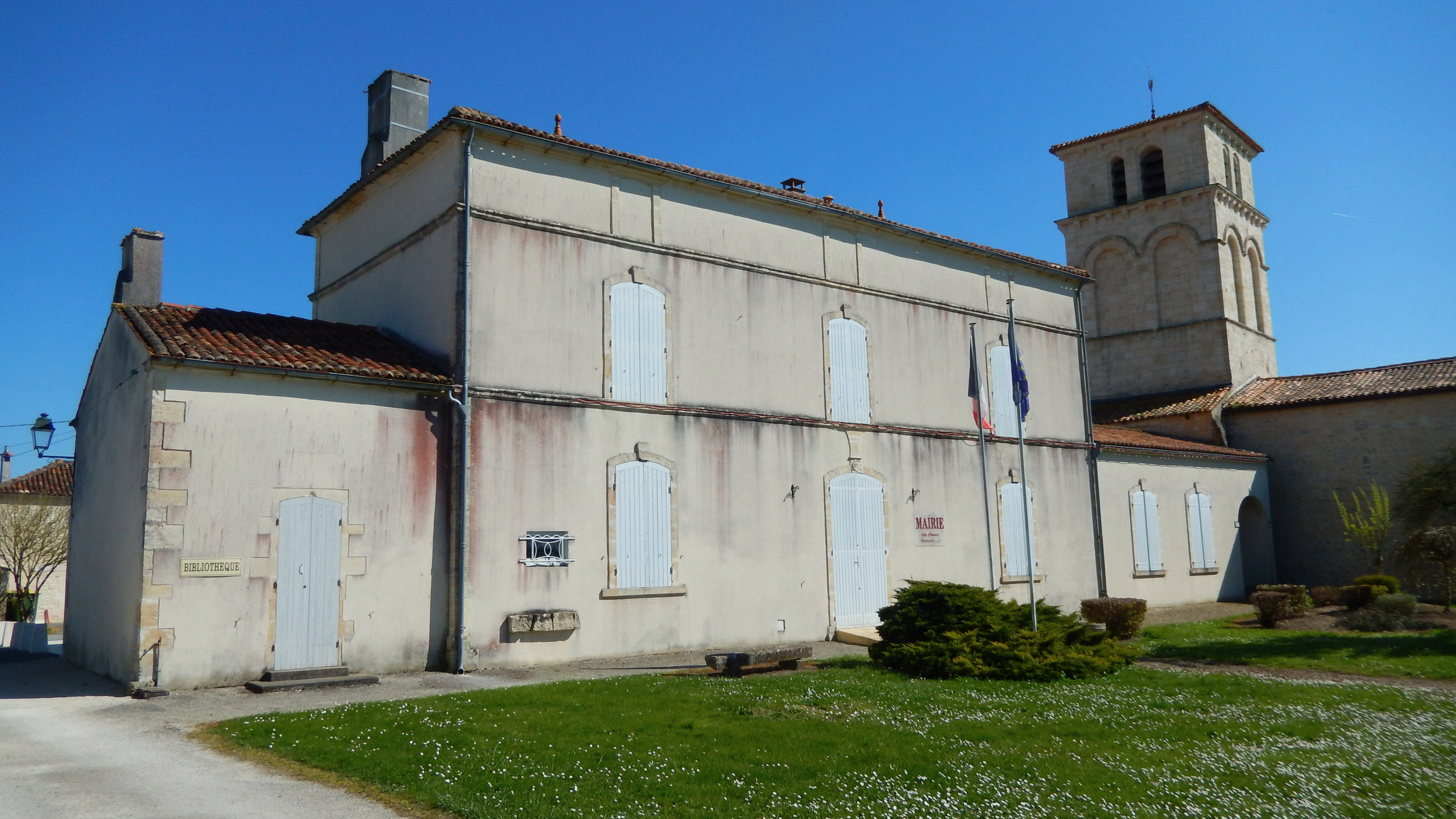 La mairie d'Archingeay, commune française du département de la Charente-Maritime.